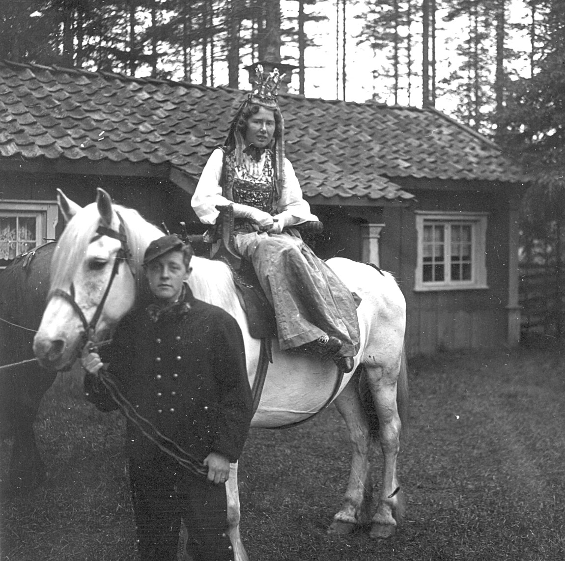 Kåring av Glomdalsbrud 1937